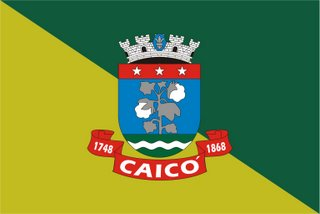 Imagem da bandeira de Caicó, cidade do Rio Grade do Norte, Brasil